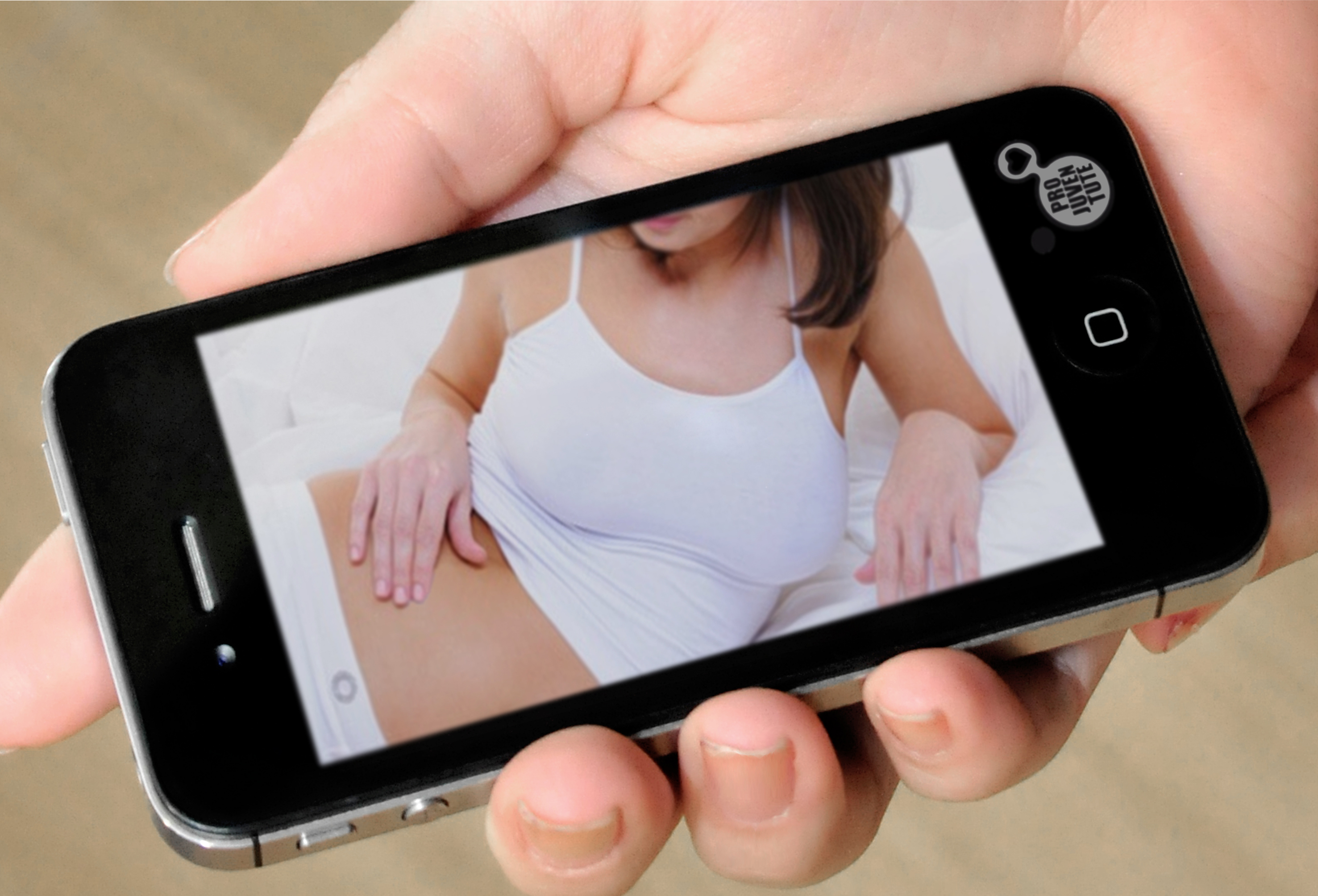 Aufklärungskampagne ‚Sexting’ Bildmaterial mit Copyright der Quellenangabe zur freien Verfügung verwendbar (©Pro Juventute) Unter dem Slogan ‚Sexting kann dich berühmt machen. Auch wenn du es gar nicht willst.‘ macht die Aufklärungskampagne von Pro Juventute auf Risiken von Sexting aufmerksam. Ein TV-Spot und Plakate zeigen provokativ auf, dass der Missbrauch von intimen Fotos harte Konsequenzen haben kann – für Betroffene wie für Täter. Mit einer für die Kampagne entwickelten Facebook-App können Jugendliche im Sinne eines Cyber-Risiko-Checks ihr Profil überprüfen. Auf der Kampagnenplattform finden Jugendliche und Eltern Informationen zum Thema. Allen Schulen in der Schweiz werden Materialien angeboten, um Jugendliche auf die Hilfe via Notrufnummer 147 von Pro Juventute aufmerksam zu machen.